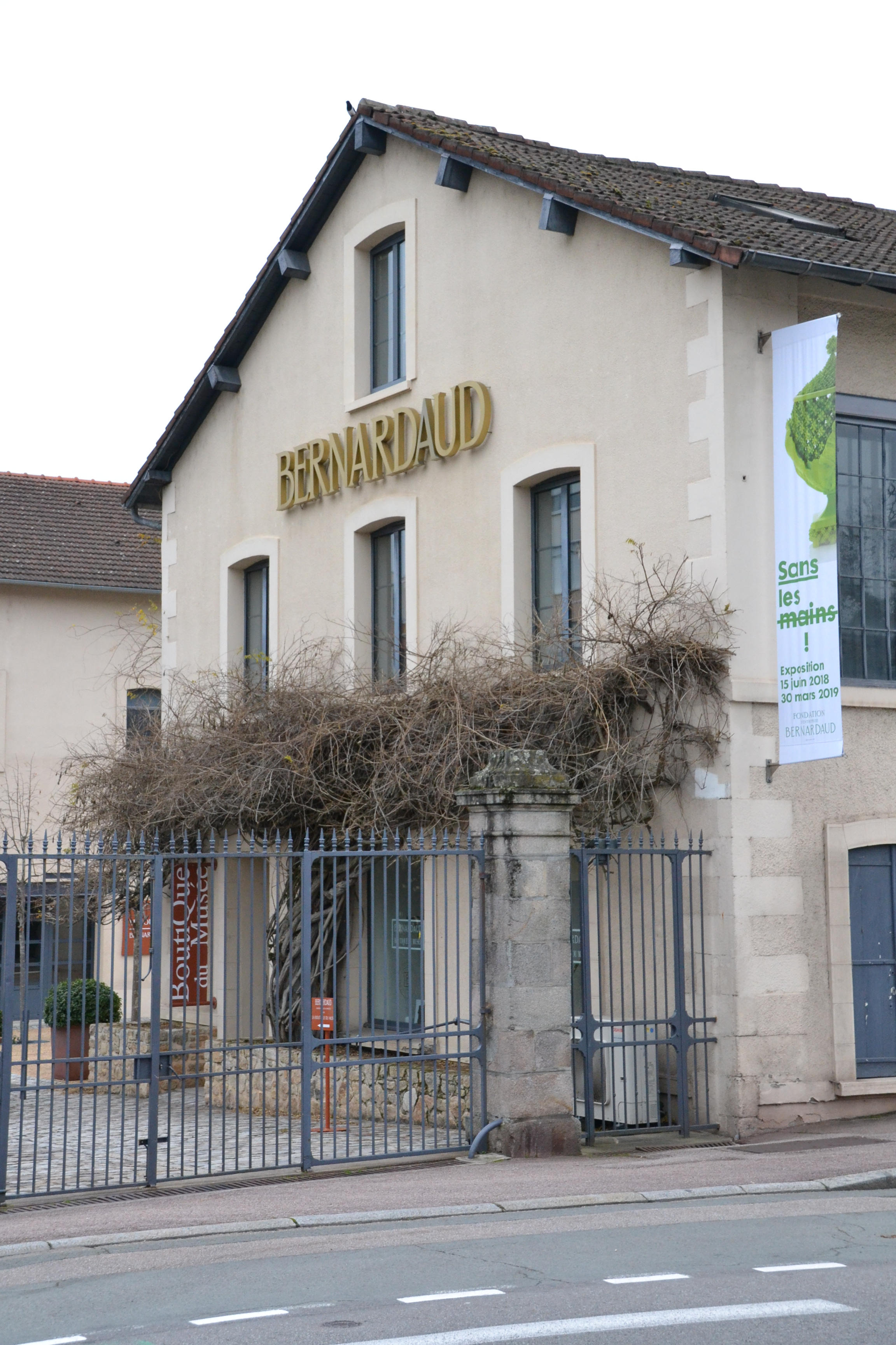 Usine historique du porcelainier Bernardaud, Limoges (Haute-Vienne, France).